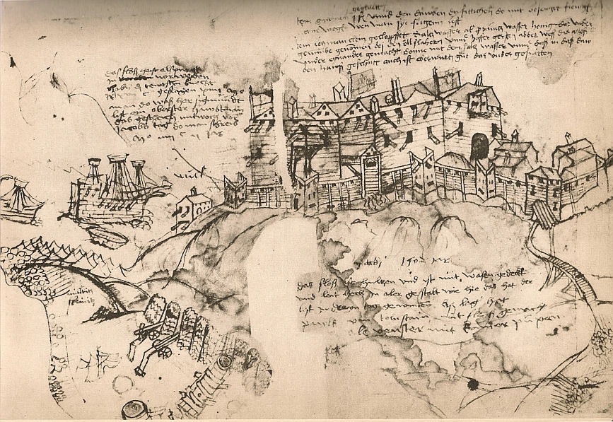 Anfallet mot Älvsborgs fästning. Teckningav landsknekten Paul Dolnstein 1502.